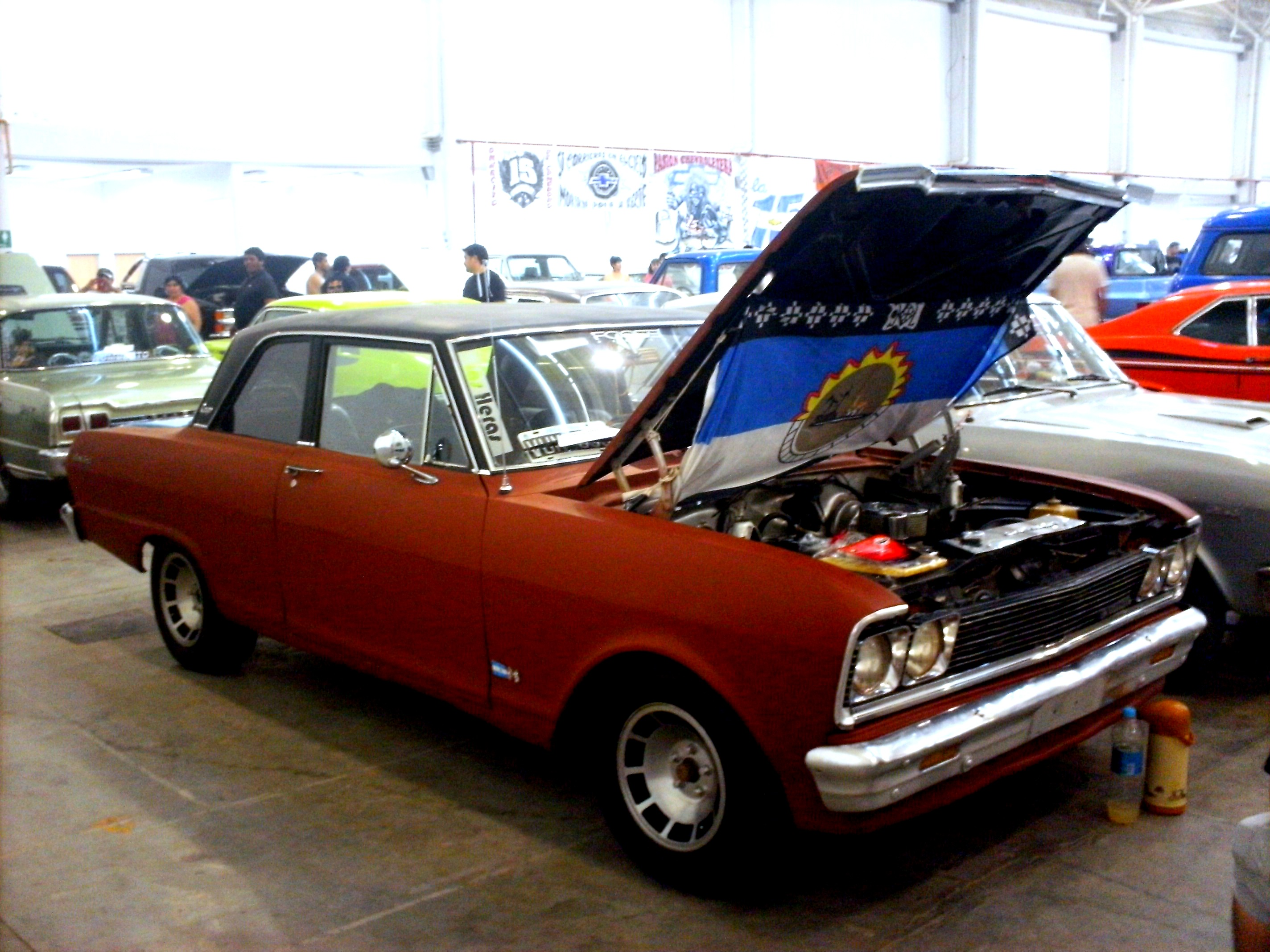 Coupe 400